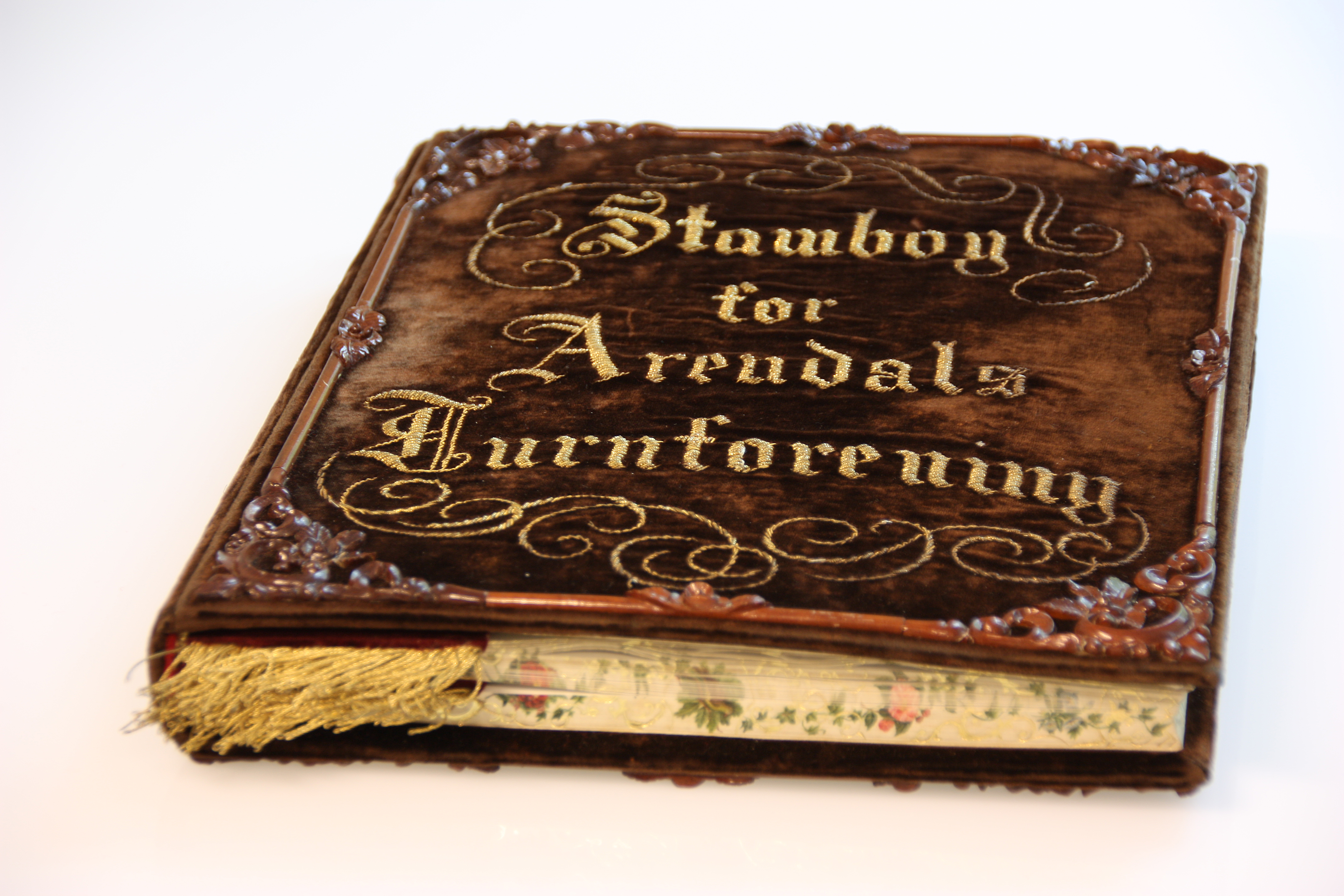 Stamboken